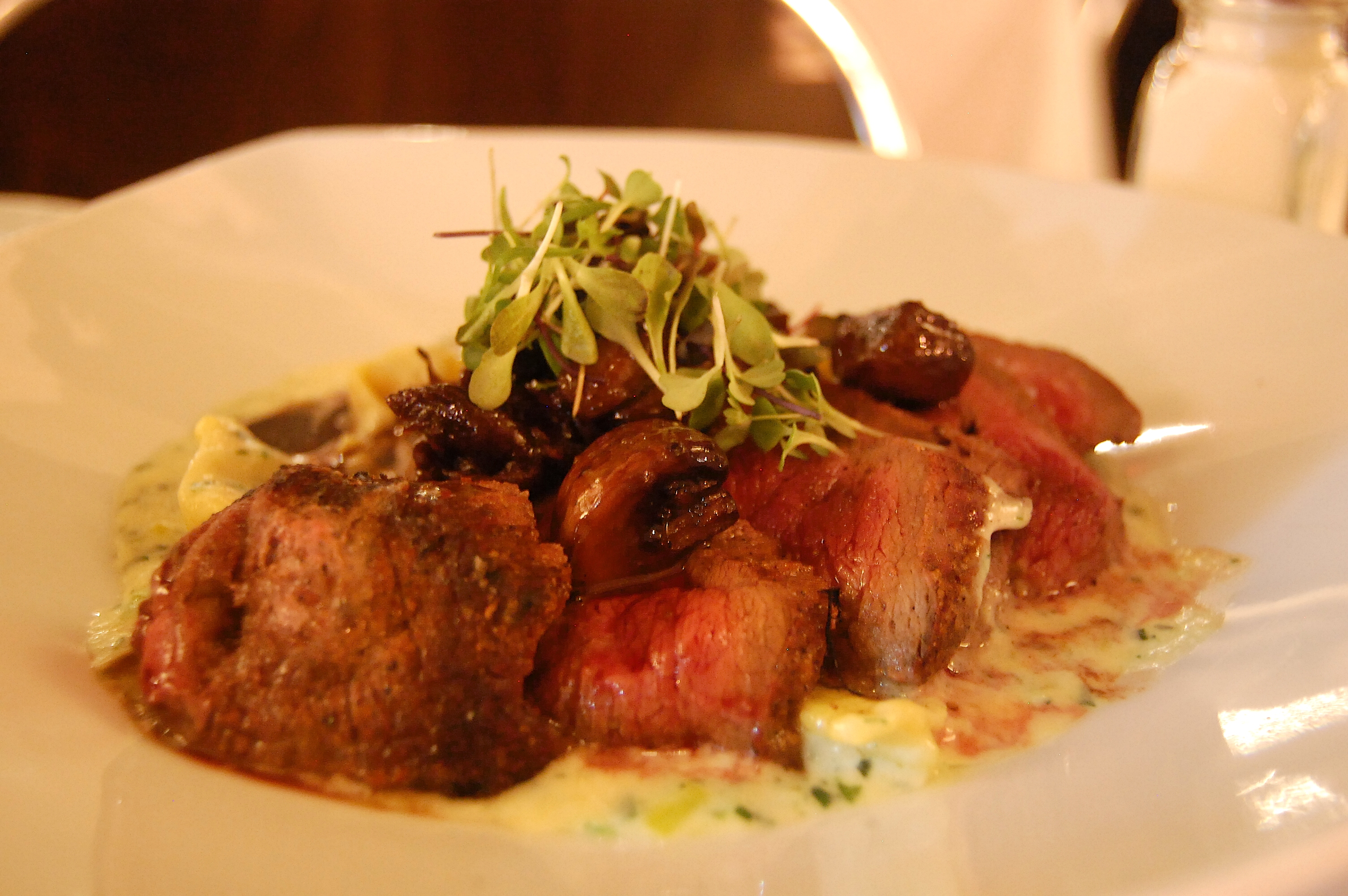 Bœuf Stroganoff